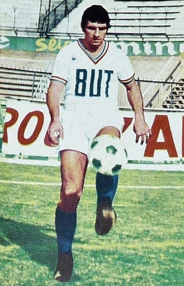 Bernard Bosquier en 1971, 'Ageducatifs Football 1971 - 1972', Panini figurina n°102.